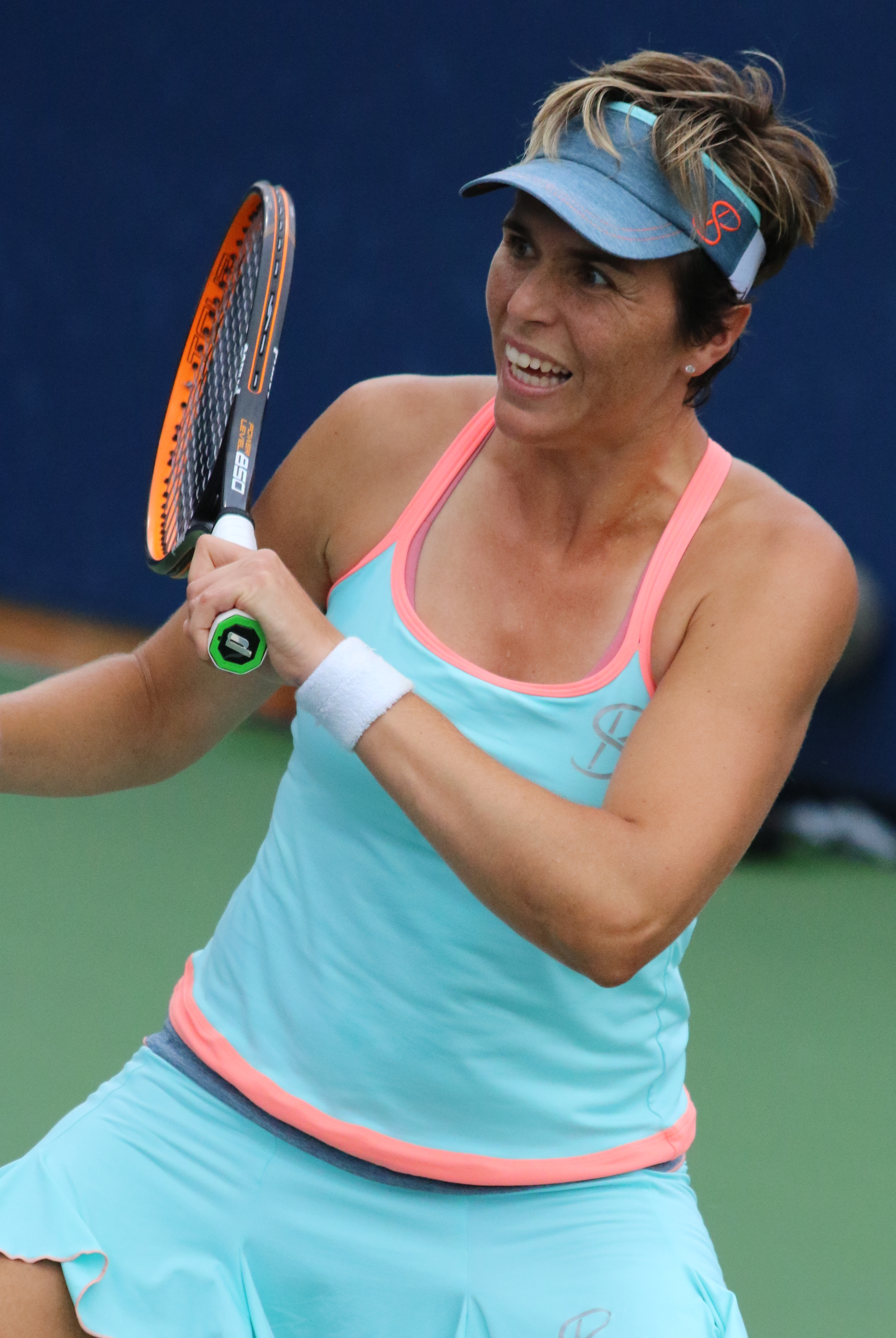 Martinez Sanchez US16 (11)